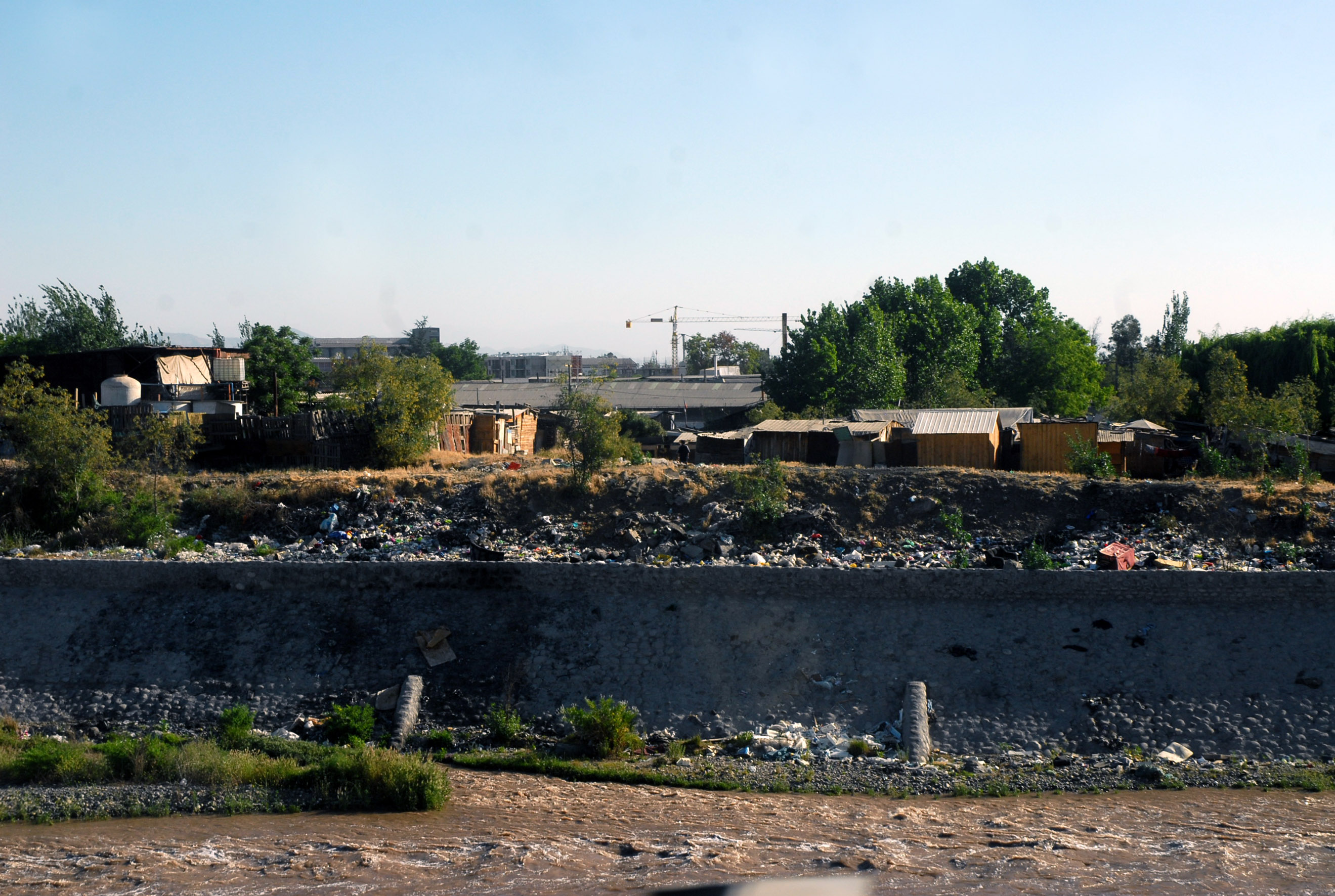 Santiago (Chile) - Pobreza nos arredores da capital chilena. Coesão social é o tema central da 17ª Cúpula Ibero-Americana de Chefes de Estado e de Governo, em curso na cidade Foto: Valter Campanato/ABr